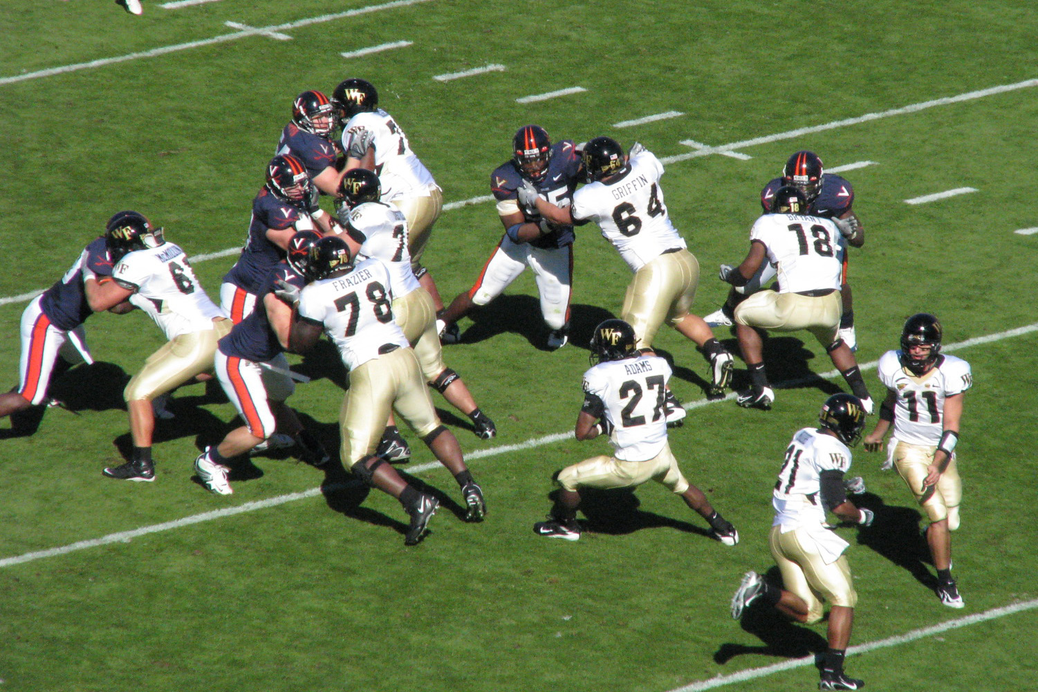 jugada de carrera con formacion 3-4